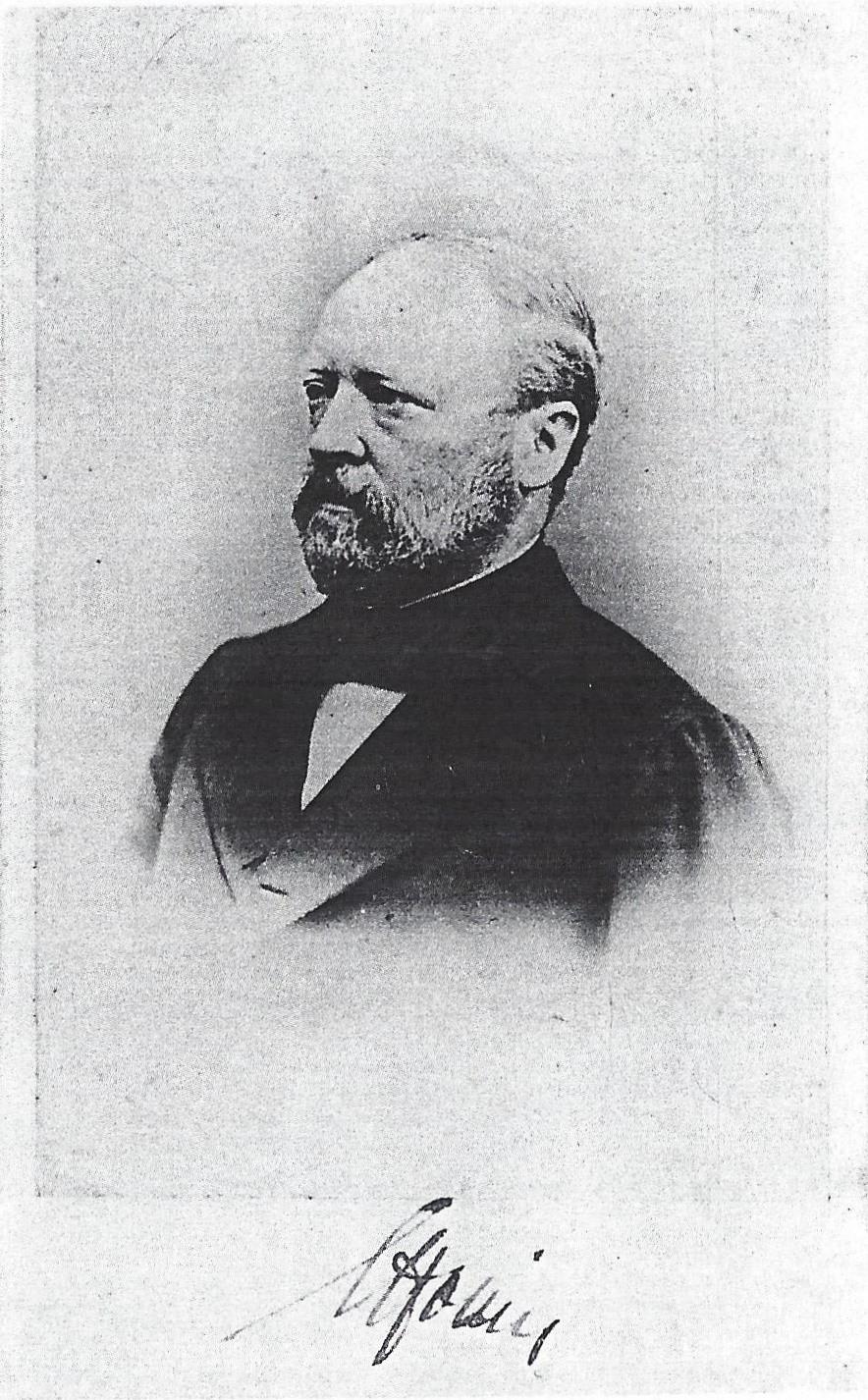 Signierte Porträtfotografie von Clemens Hosius (1822-1902)